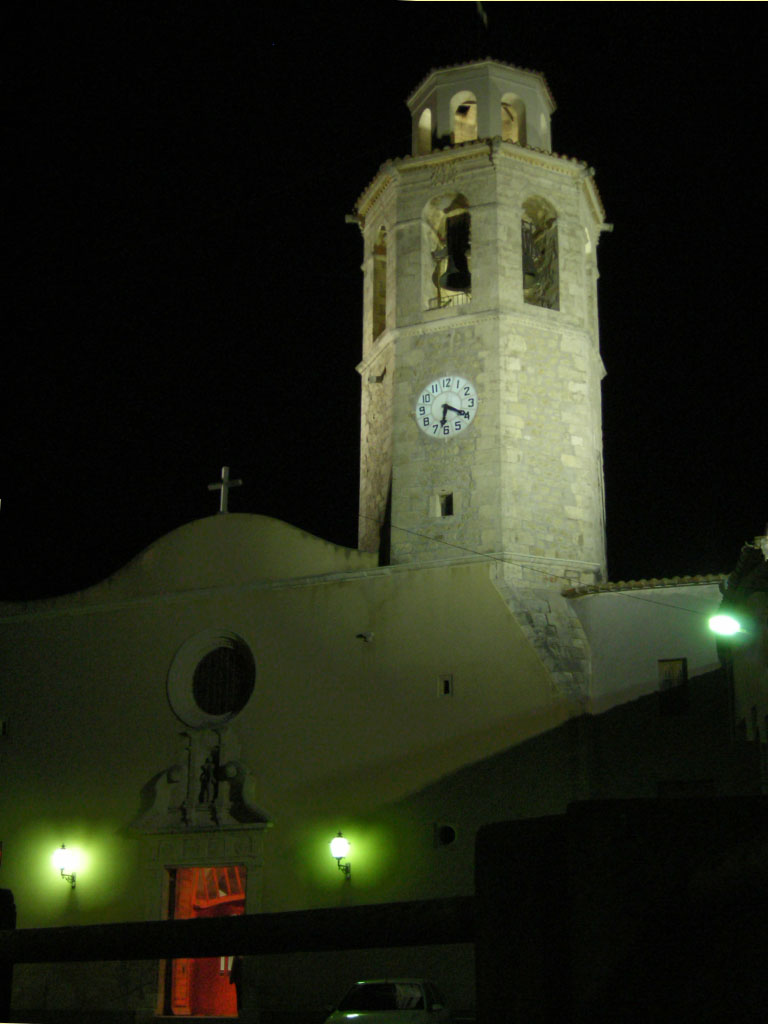 Església de la Granada (Penedès) al vespre